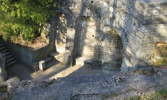 Toila, Estonia